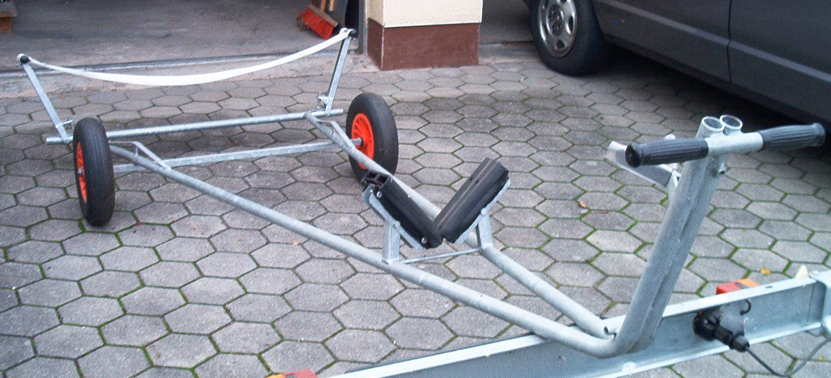 Slipwagen z.B. zu Bootstrailer Typ 250 S (Fa. Harbeck)